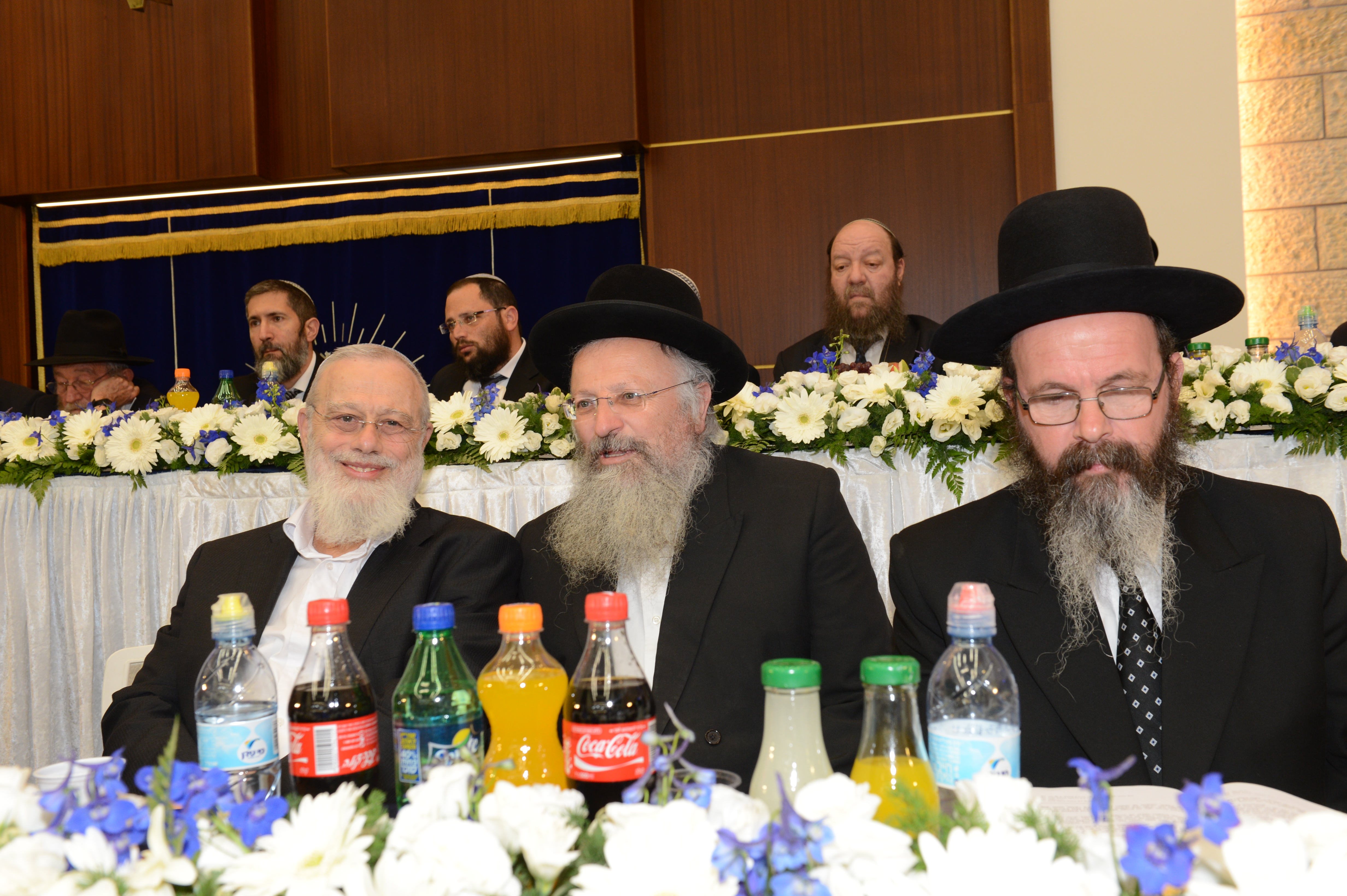 הרב מיכה הלוי הרב איתן איזמן הרב שמואל אליהו ביום ירושלים בישיבת מרכז הרב